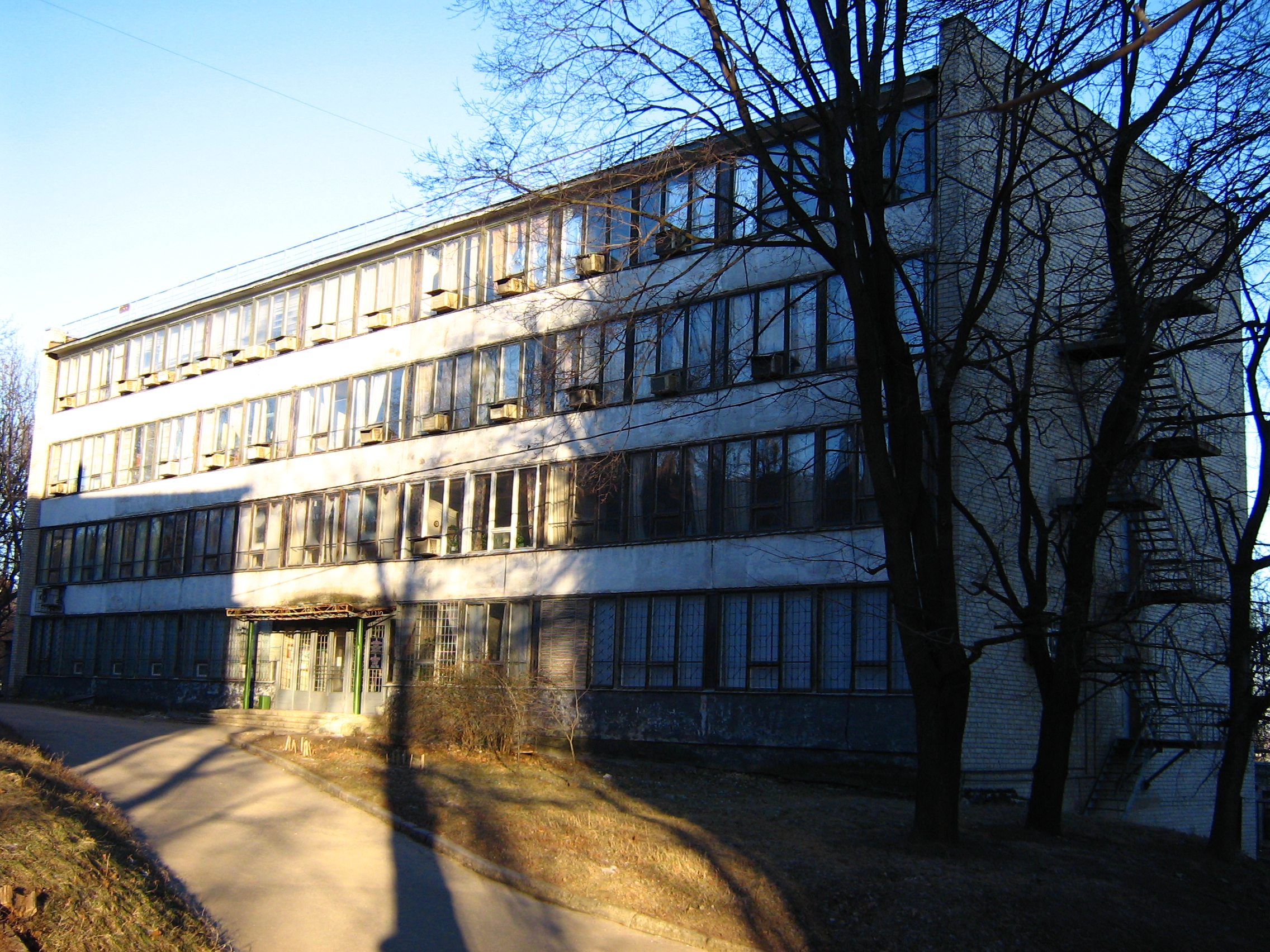 Radiokorpus Kharkov Institute politehnic